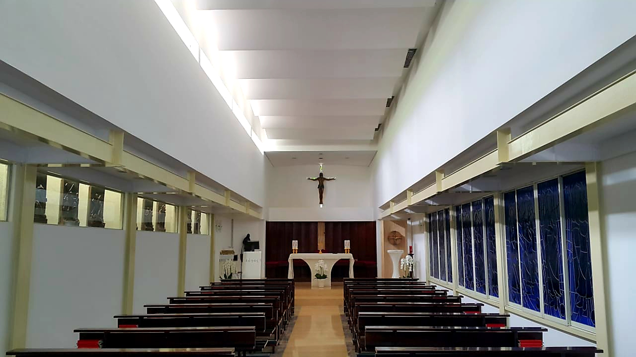 Kapel Kedutaan Besar Vatikan di Jakarta